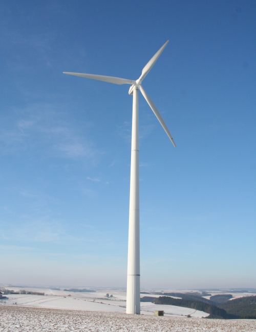 Wandenergieanlag am Wandpark zu Hengescht (Januar 2006)